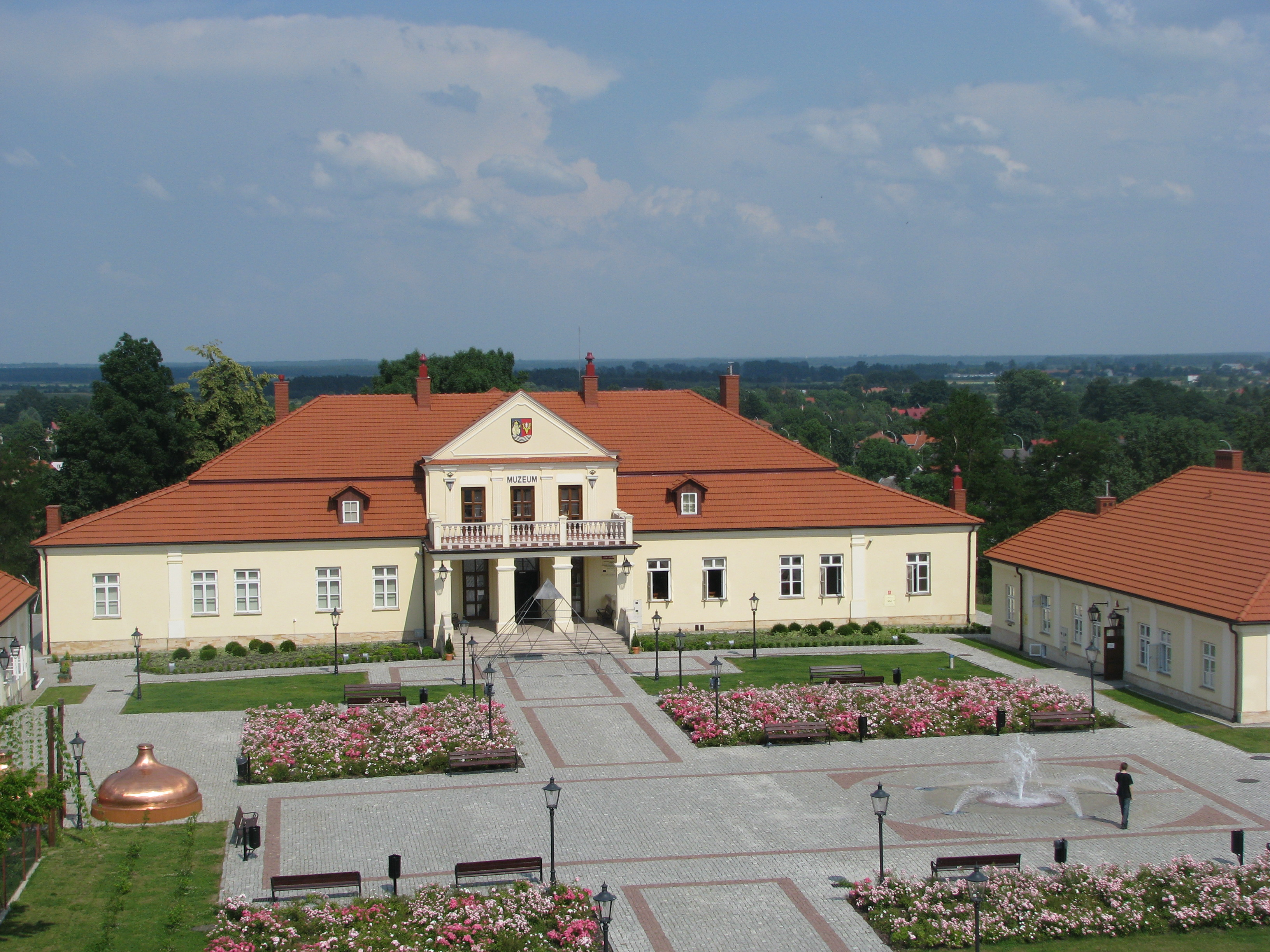 Leżajsk, dwór starościński, ob. Muzeum Ziemi Leżajskiej, 1760-1770, 1933